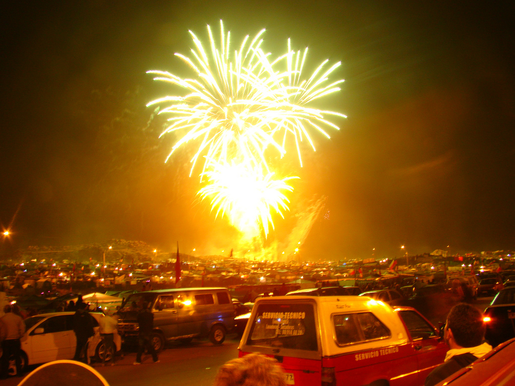 Fuegos Artificiales Pampilla Coquimbo Chile